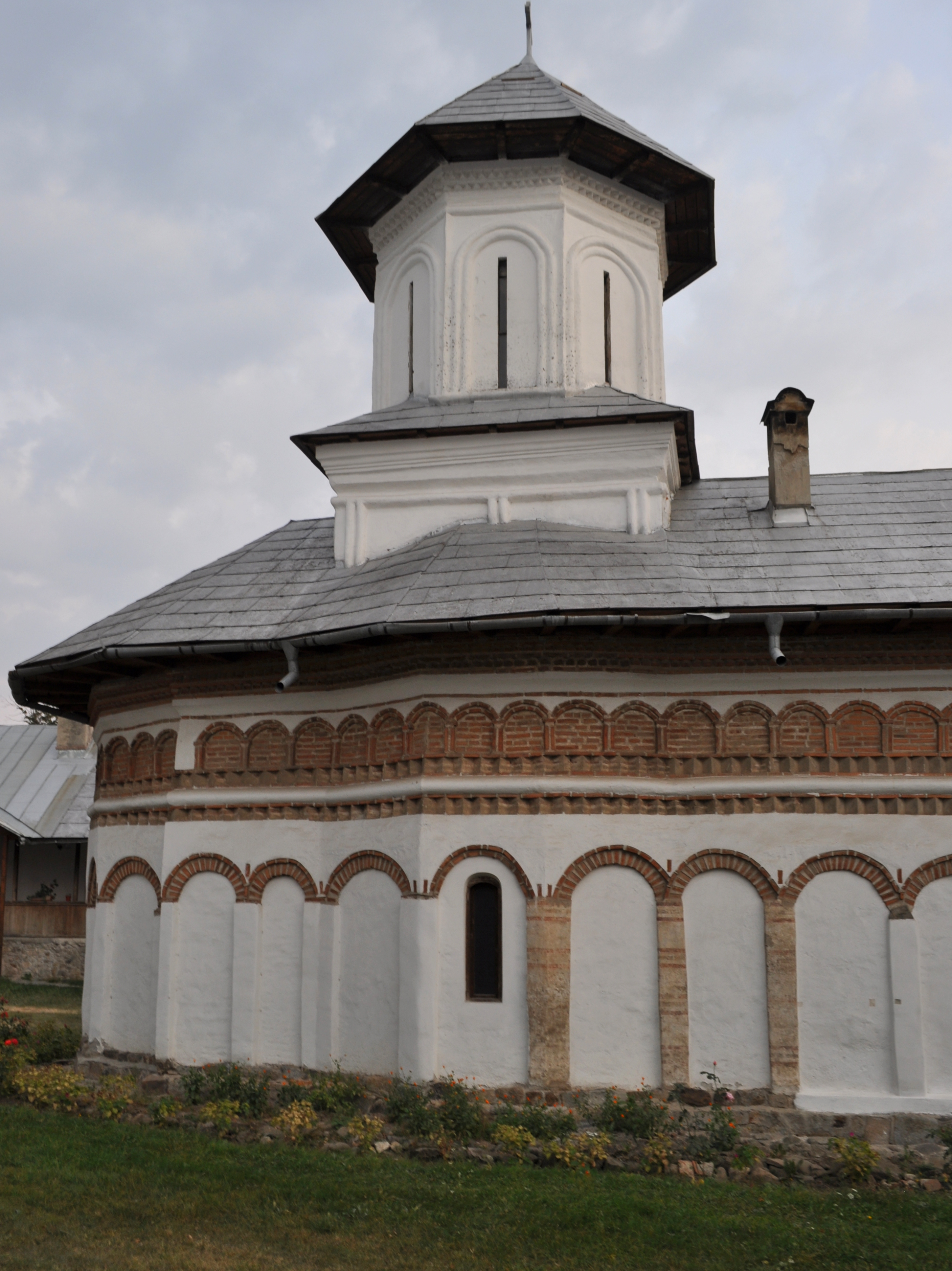 Ansamblul schitului Crasna, județul Gorj